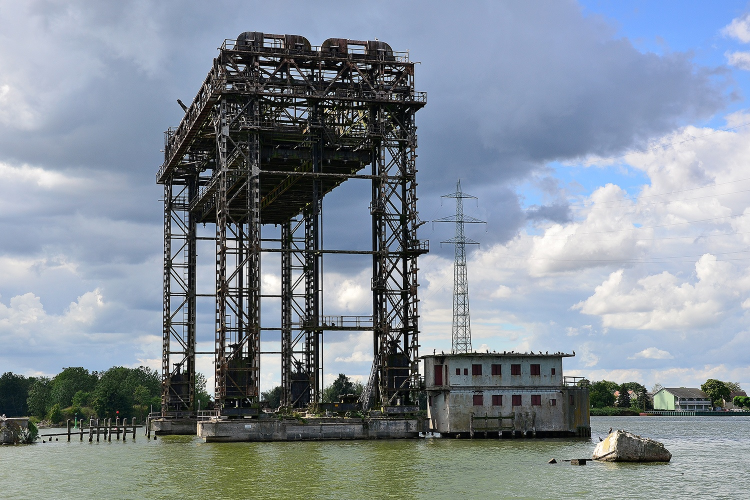 Ehemalige Eisenbahnhubbrücke Karnin, Usedom, Datum/Uhrzeit: 26.08.2012 12:37:28